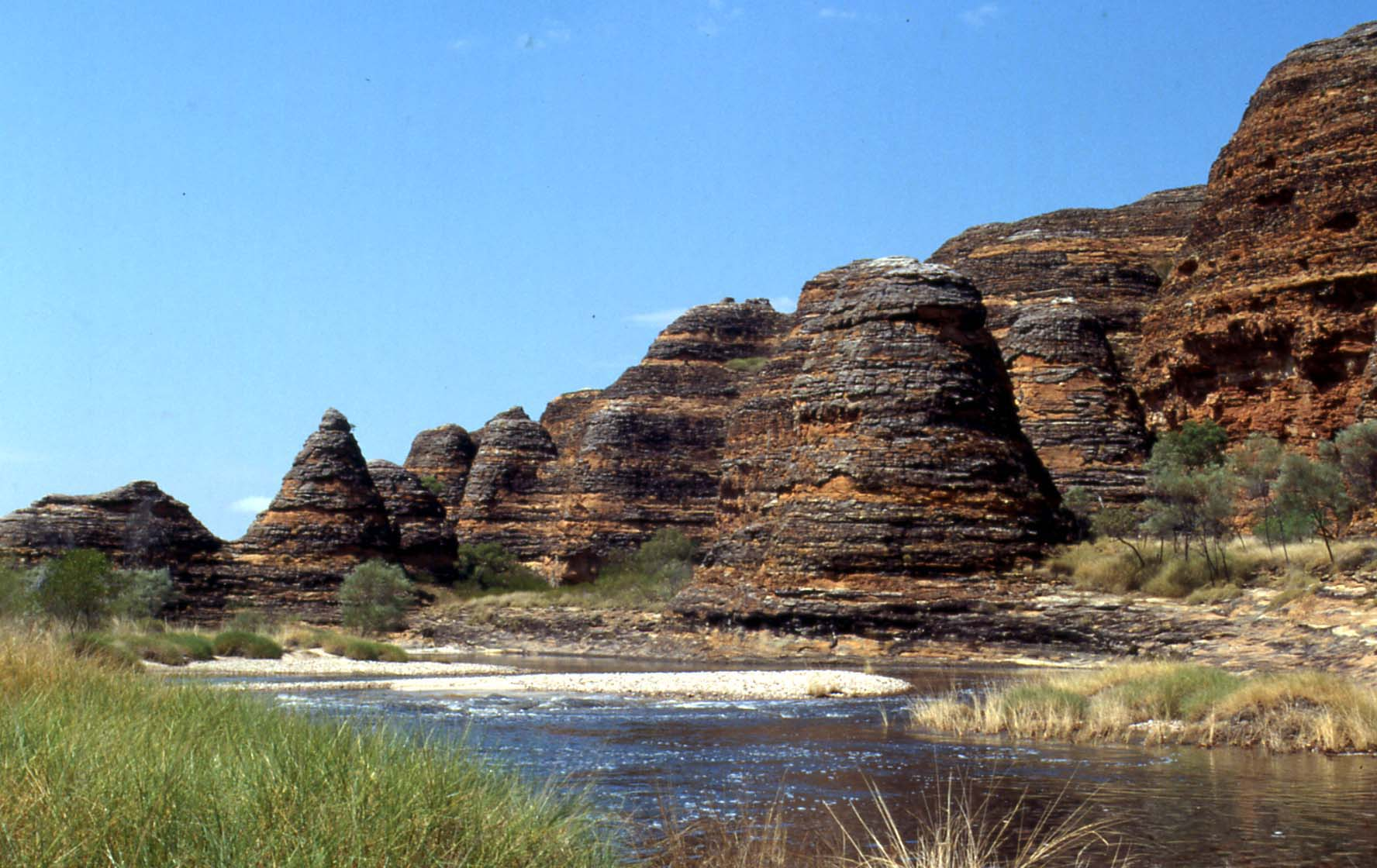 Purnululu